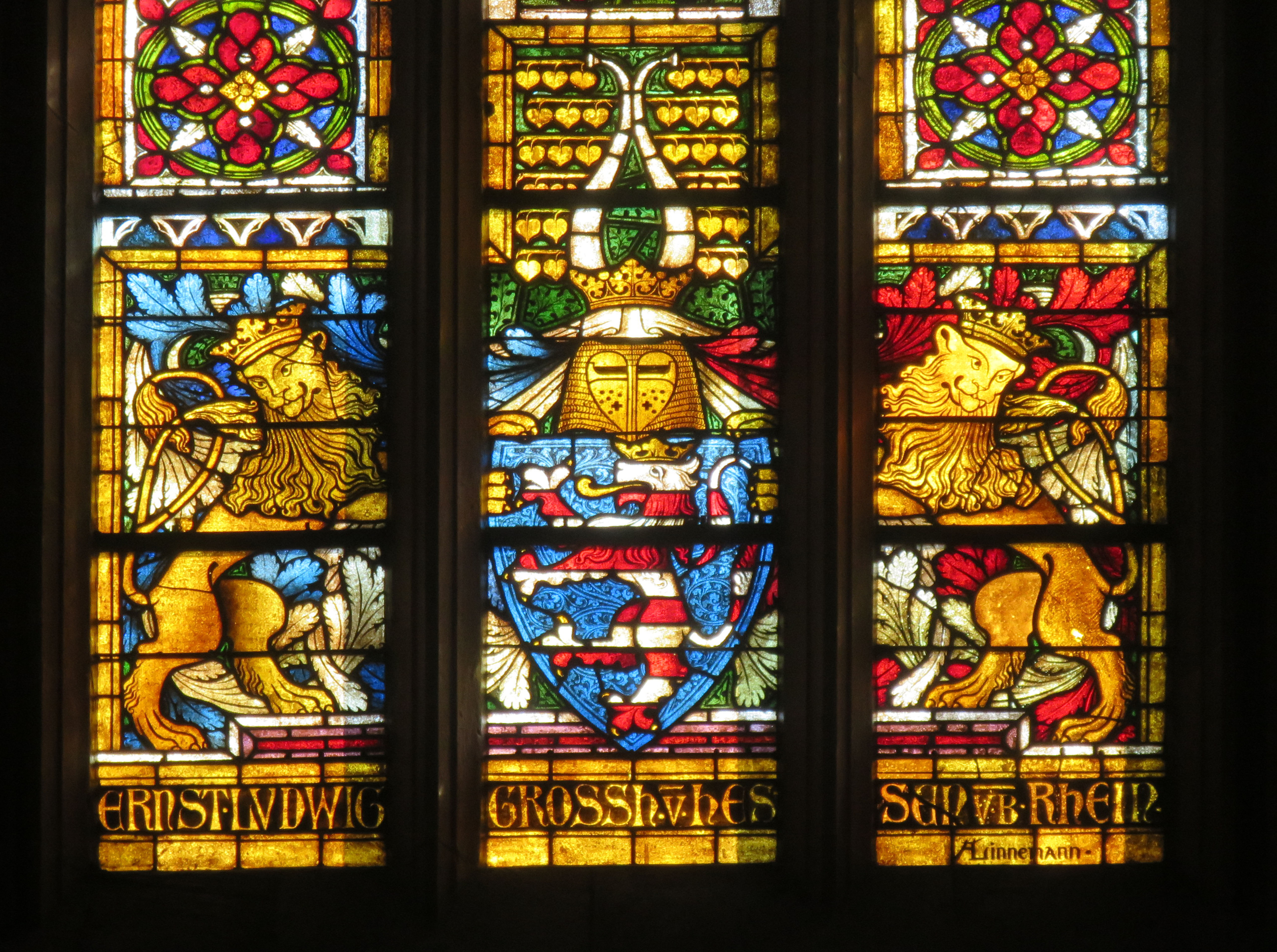 Ausschnitt aus einem von Großherzog Ernst-Ludwig gestifteten Glasfenster in der Stadtkirche Friedberg